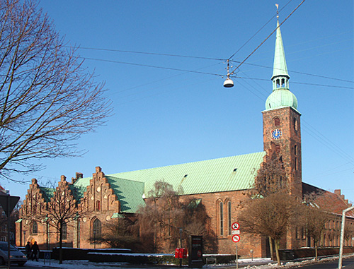 Vor Frue Kirke Århus, Denmark